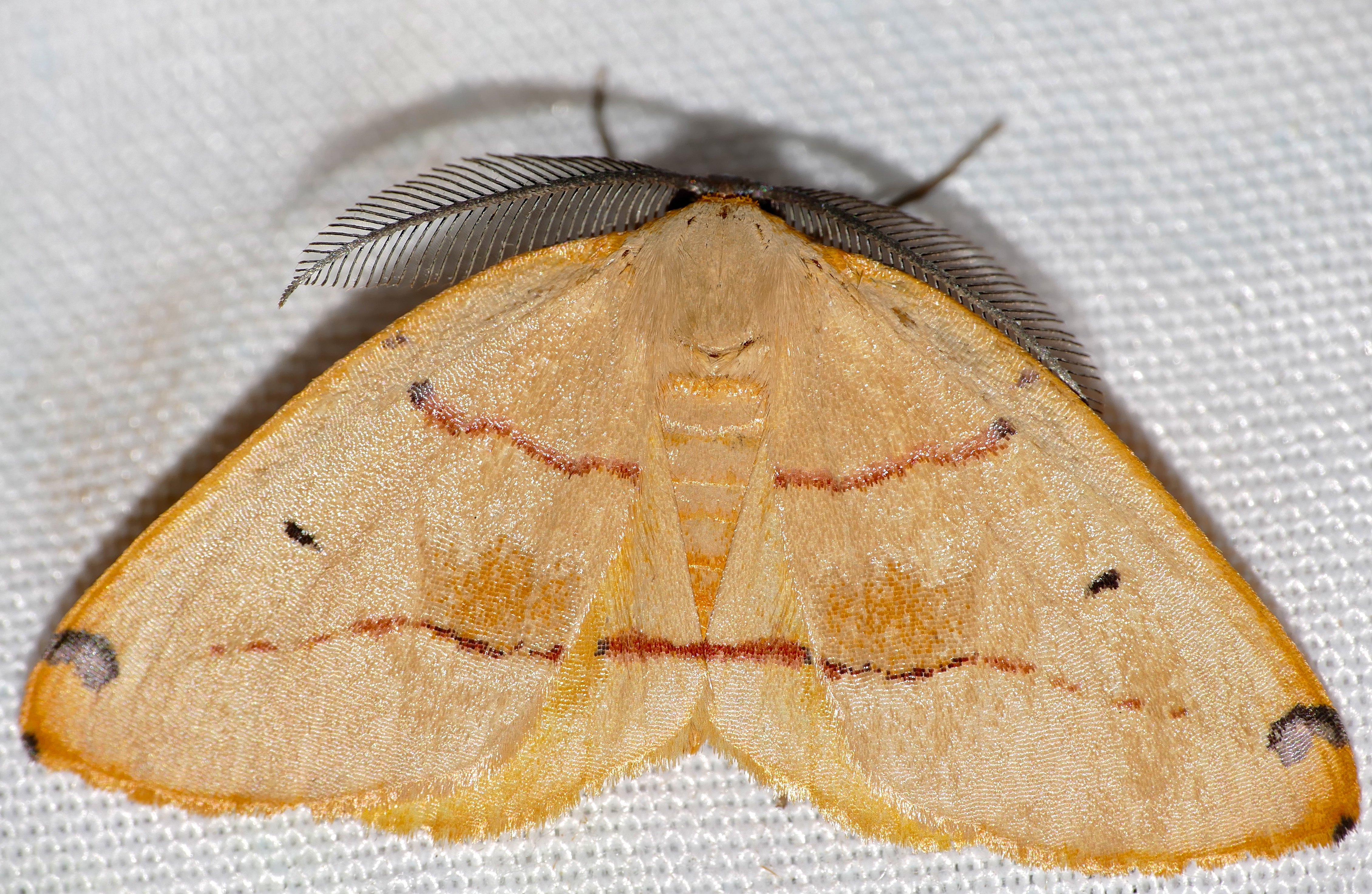 Mpila Camp, iMfolozi Game Reserve, Hluhluwe-iMfolozi Park, Kwazulu-Natal, SOUTH AFRICA